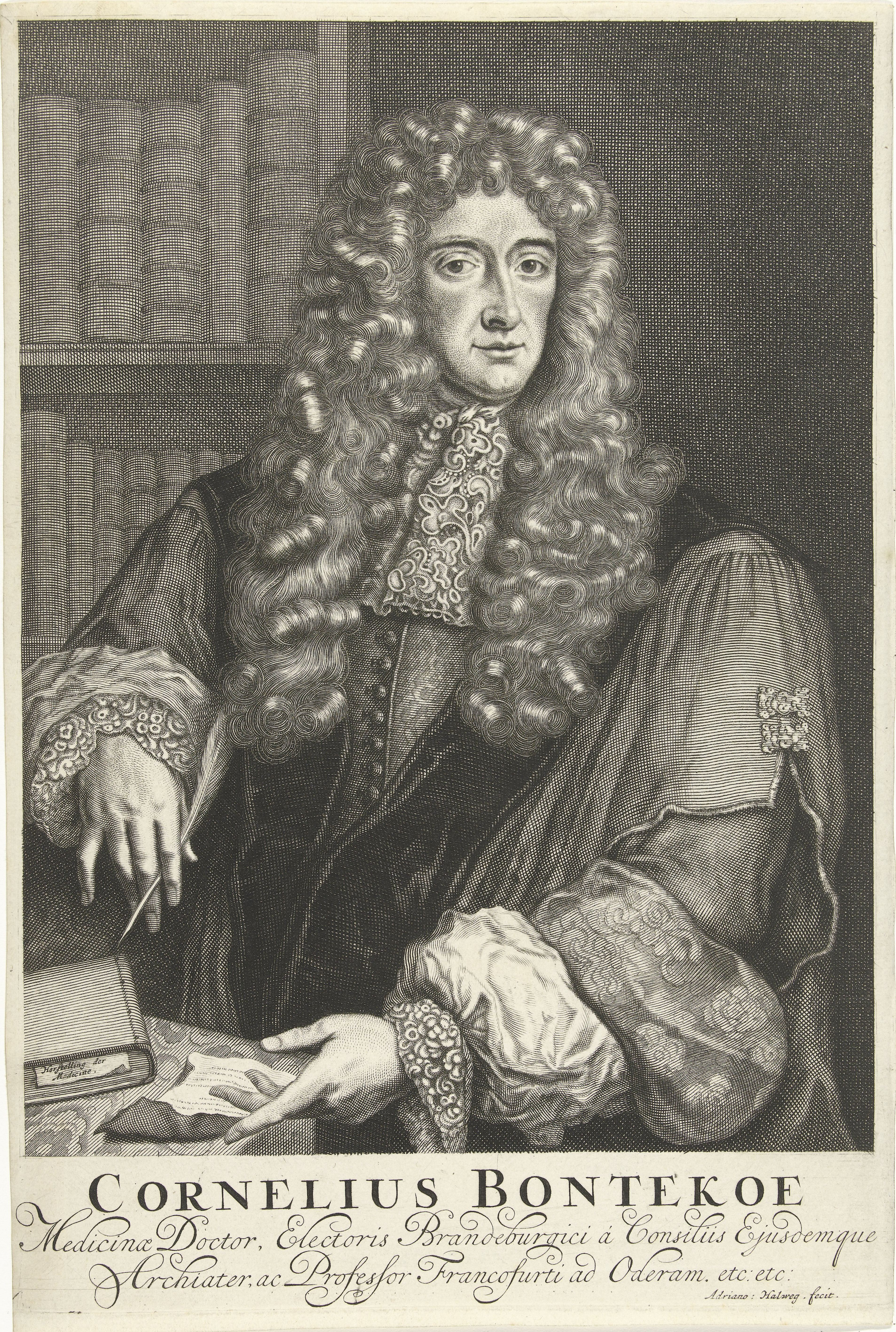 IdentificatieTitel(s): Portret van Cornelis BontekoeObjecttype: prent Objectnummer: RP-P-OB-55.644Catalogusreferentie: Hollstein Dutch 2FMP 543Opschriften / Merken: verzamelaarsmerk, verso midden, gestempeld: Lugt 2228Omschrijving: Portret ten halven lijve van de arts Cornelis Bontekoe aan een tafel in een interieur met boeken.VervaardigingVervaardiger: prentmaker: Adriaen Haelwegh (vermeld op object)Plaats vervaardiging: Noordelijke NederlandenDatering: ca. 1647 - ca. 1696Fysieke kenmerken: gravureMateriaal: papier Techniek: graveren (drukprocedé)Afmetingen: blad: h 280 mm (afgesneden op plaatrand) × b 192 mmOnderwerpWat: study; 'studiolo'; libraryWie: Cornelis BontekoeVerwerving en rechtenVerwerving: onbekendCopyright: Publiek domein